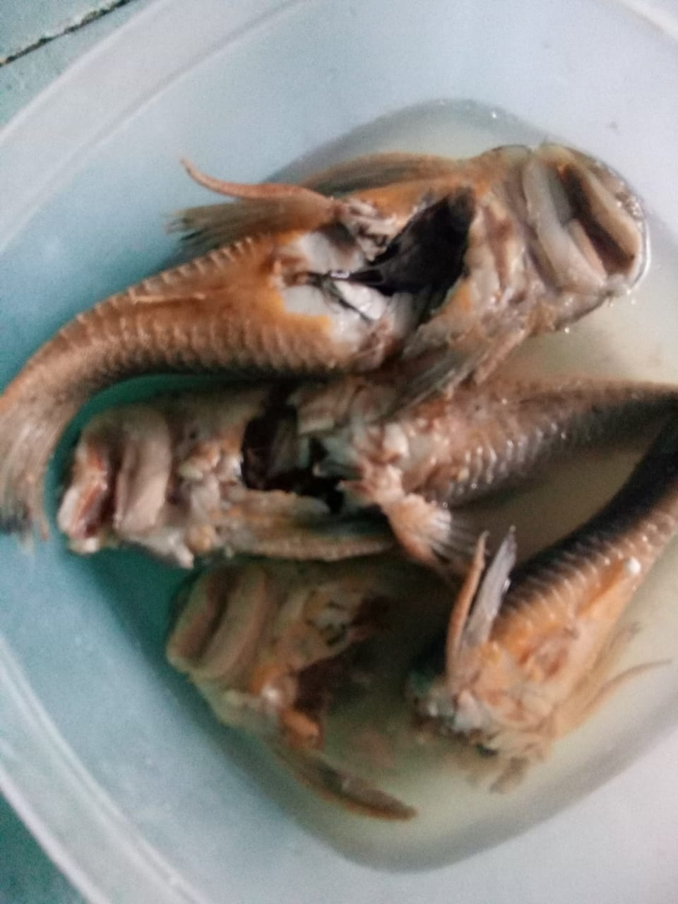 imagen de caldo de carachama.